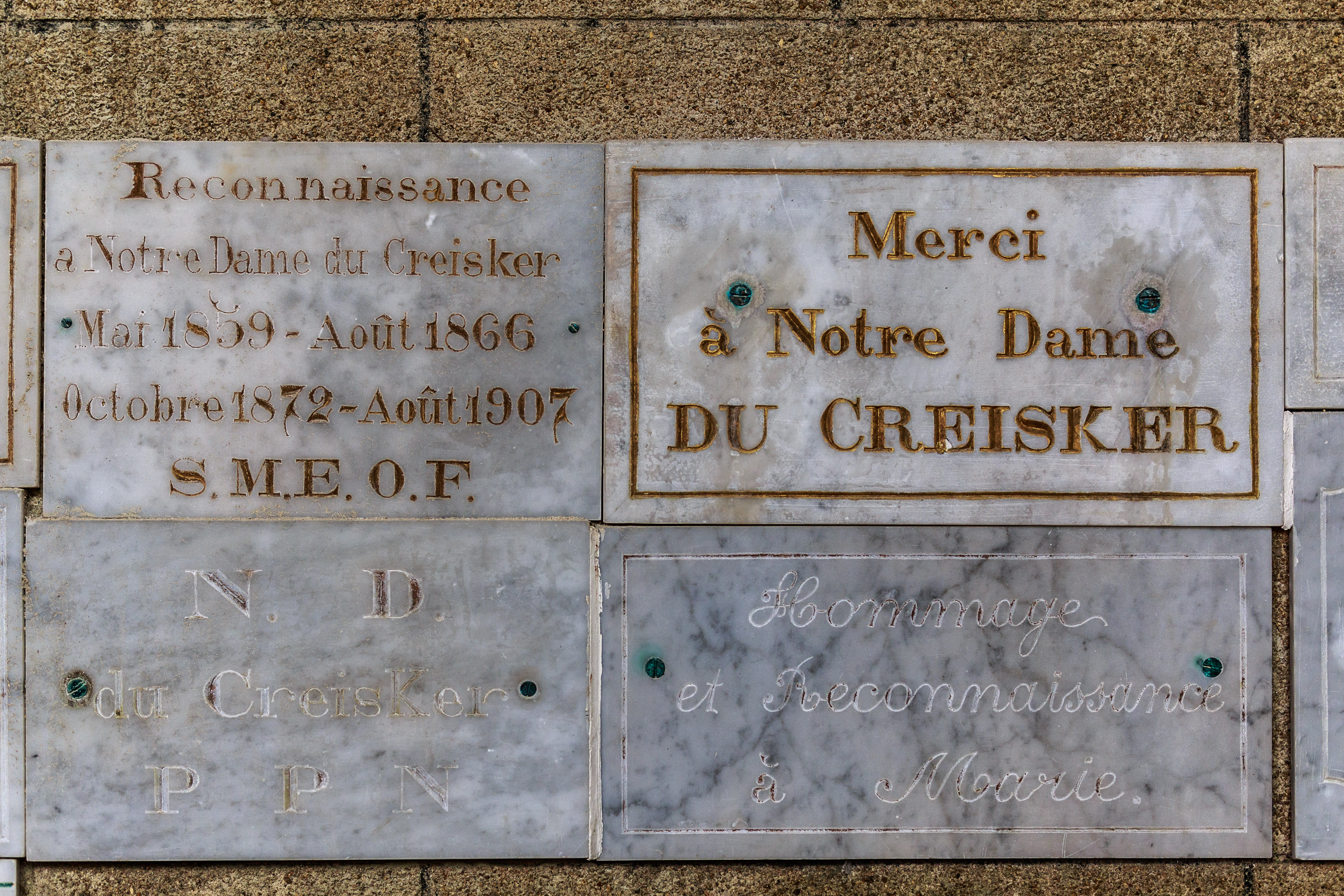 Plaques de remerciements dans la chapelle Notre-Dame-du-Kreisker à Saint-Pol-de-Léon (Finistère).